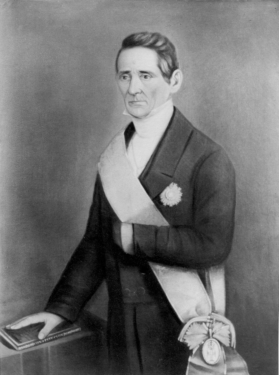 Retrato de Joaquín Suárez portando la banda presidencial. Político uruguayo presidente interino entre 1843 y 1852.